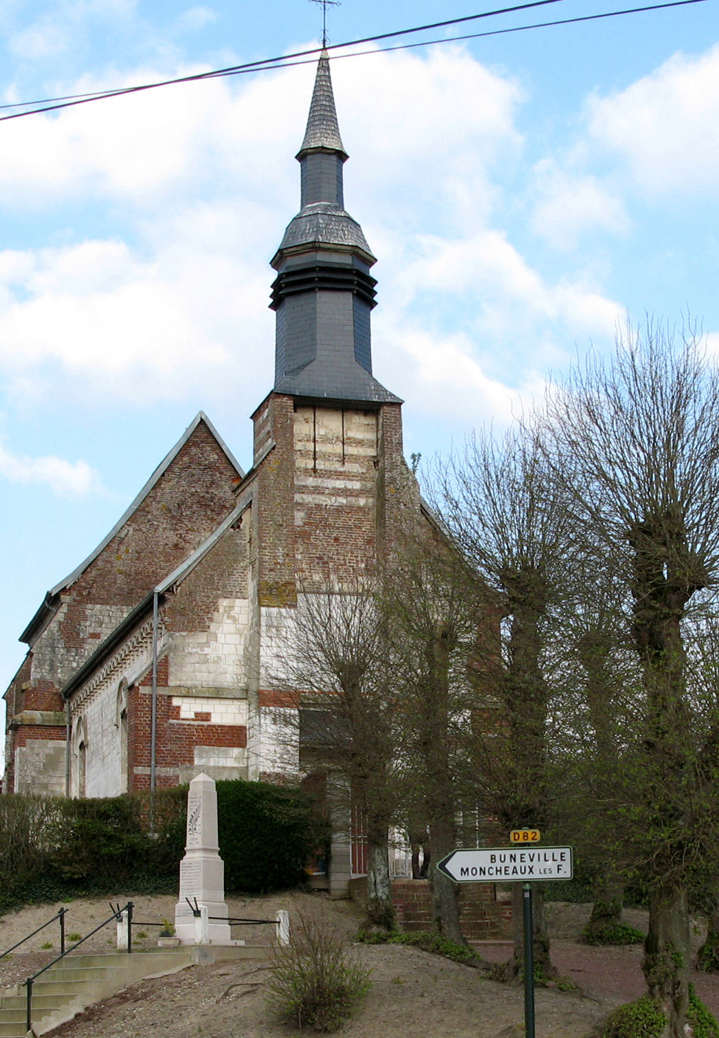 Sibiville (Pas-de-Calais, France) - L'église et le monument-aux-morts. .